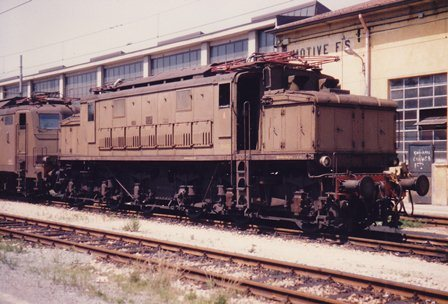 Locomotive presso il deposito di Milano San Rocco